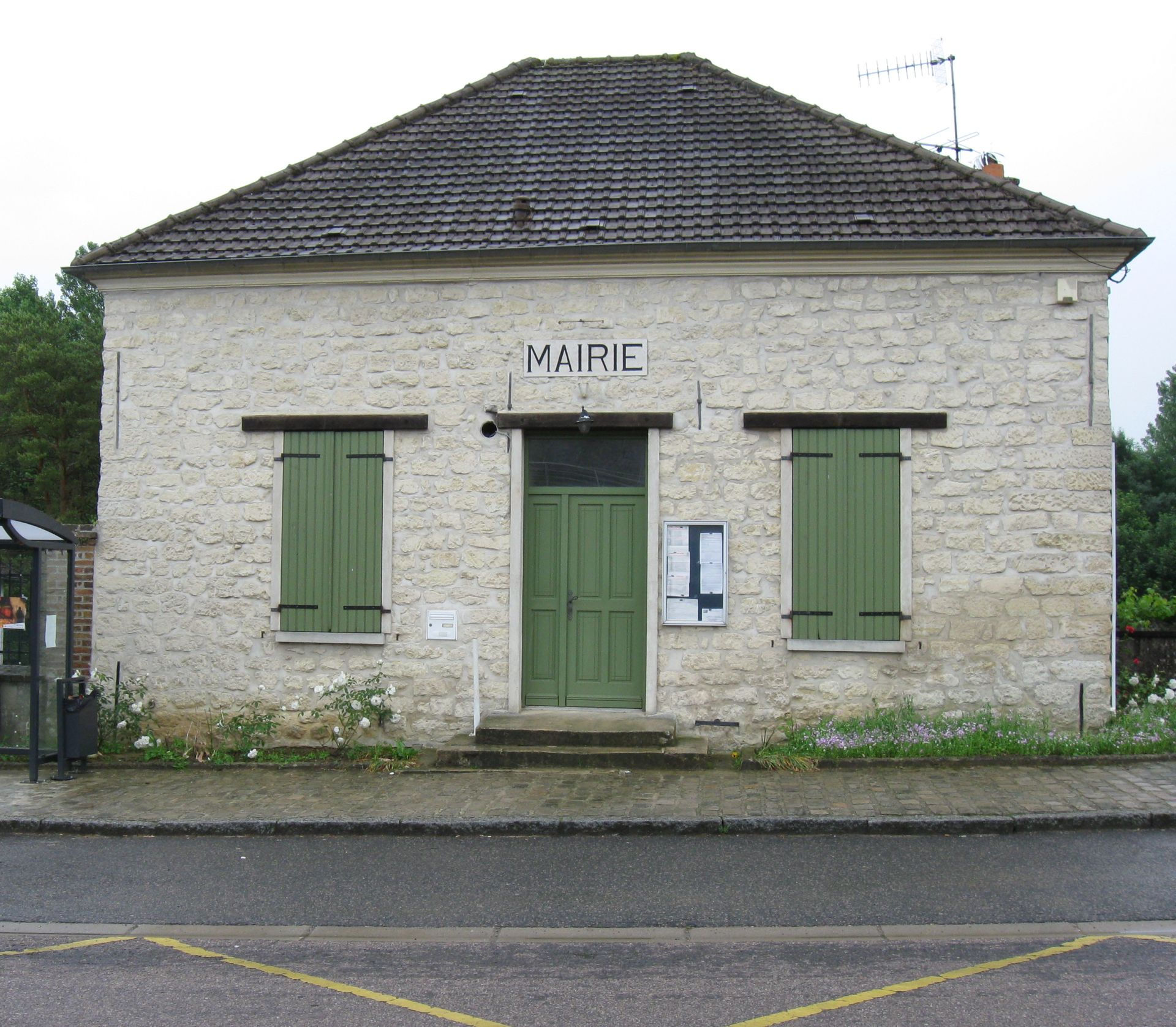 Mairie de Neufchelles. (Oise, Picardie).